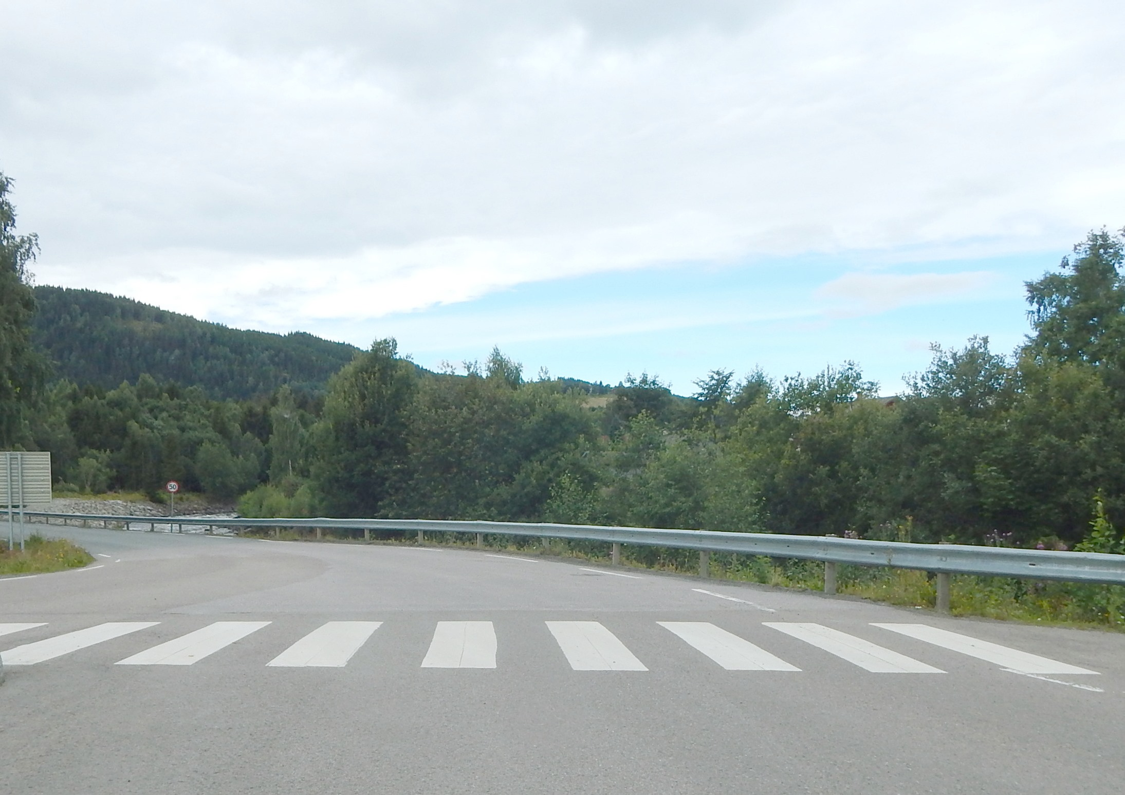 Kragebergvegen (tidl. fylkesvei 167, nå kommunal vei 5347) sett fra Birivegen (fylkesvei 330)